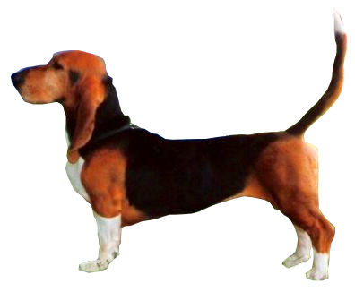 Basset artésien normand sur fond blanc